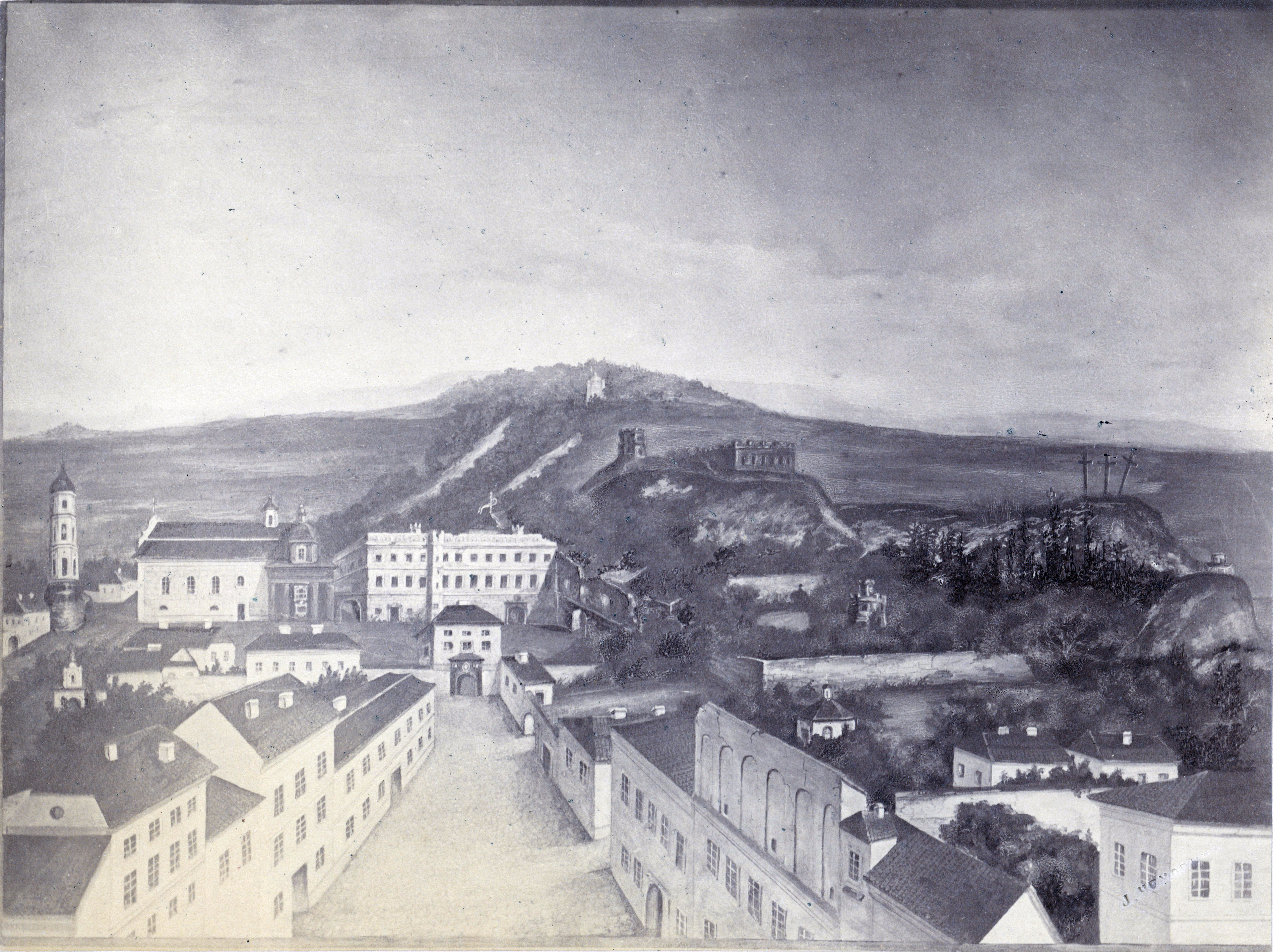 Беларуская (тарашкевіца): Вільня (Vilnia), вуліца Замкавая (vulica Zamkavaja)